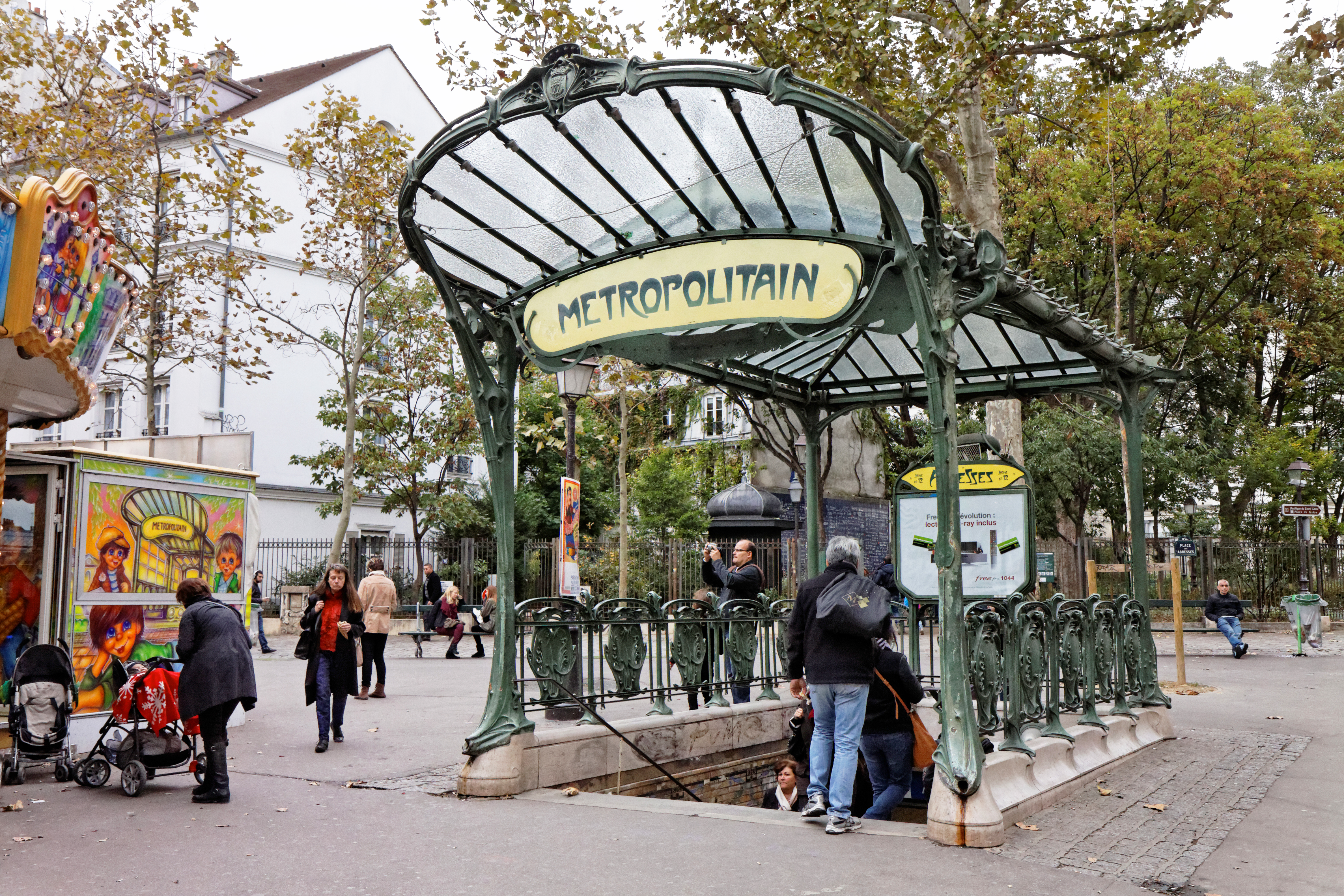 La station de métro Abbesses à Paris.